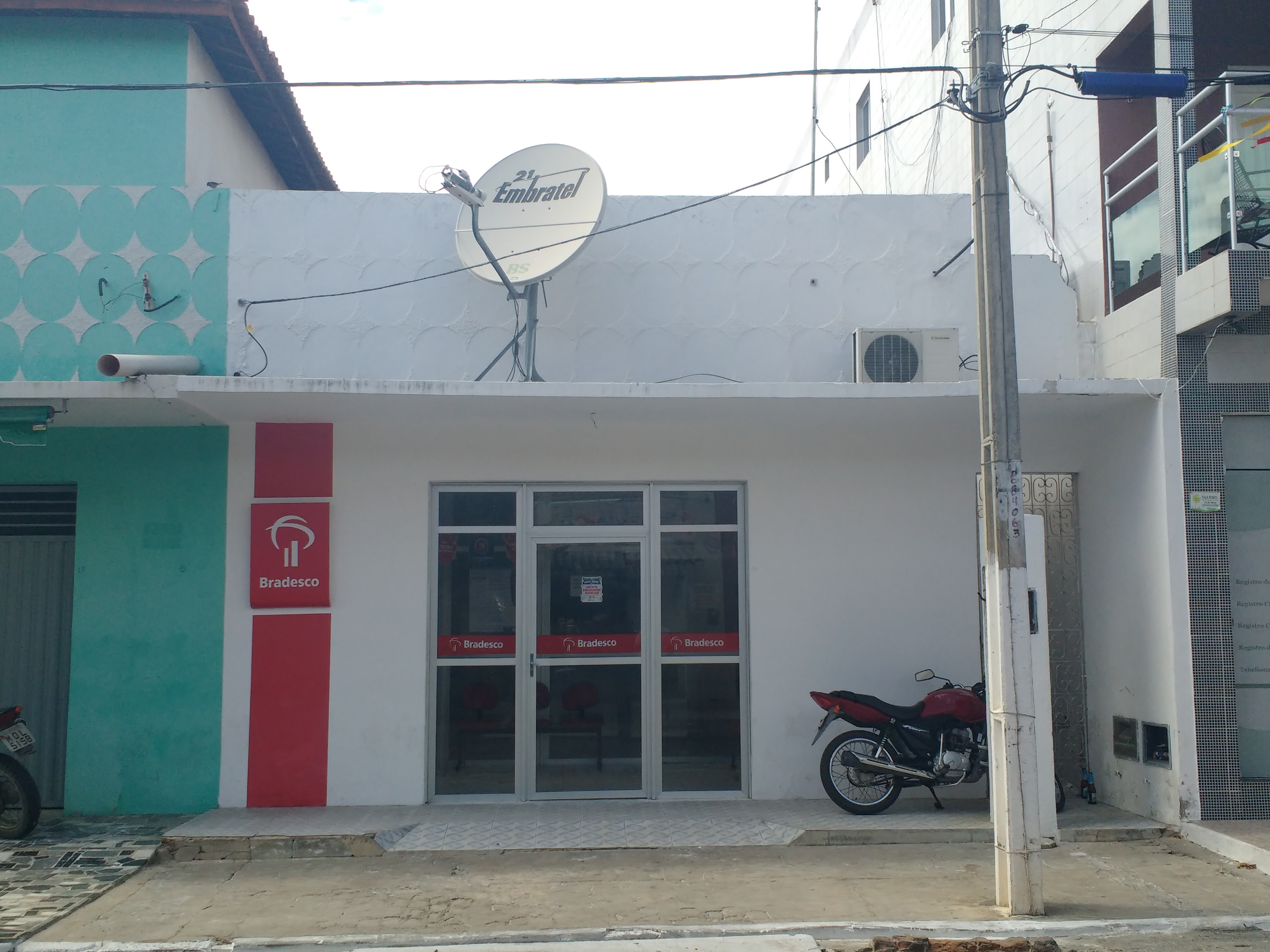 Agência bancária do Bradesco em Marcelino Vieira, Rio Grande do Norte (Brasil).